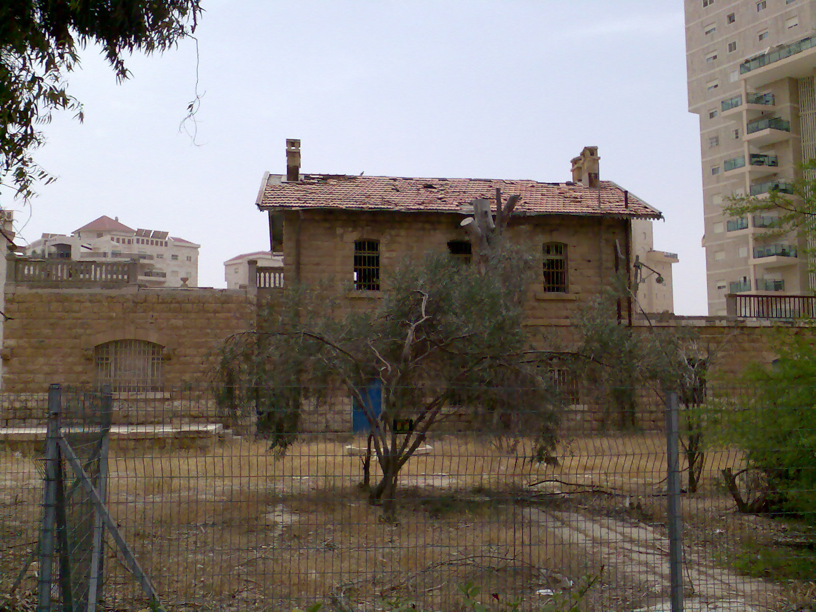 Birüssebi'deki Türk demiryolu istasyonu.